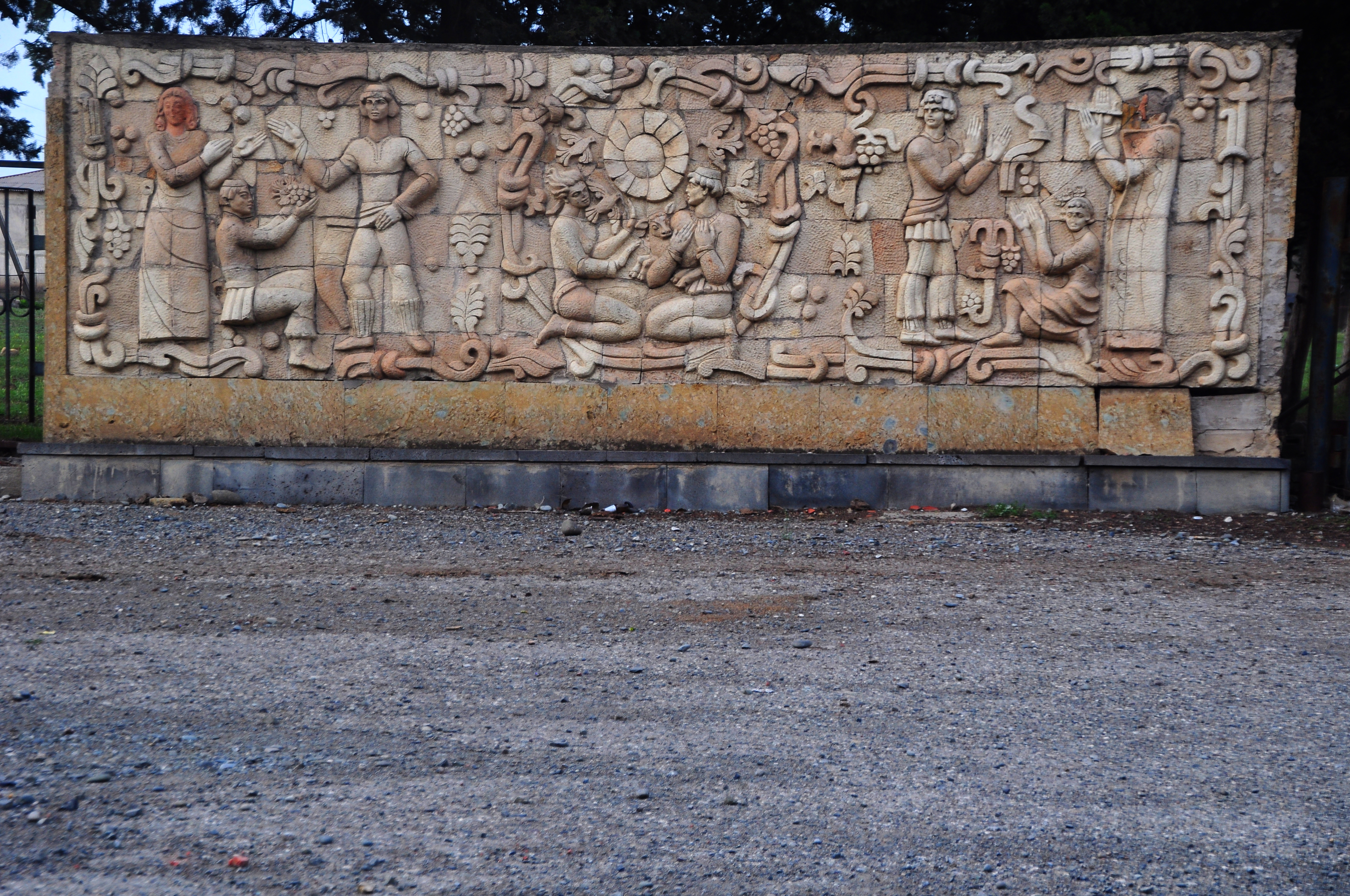 17702 Rustavi